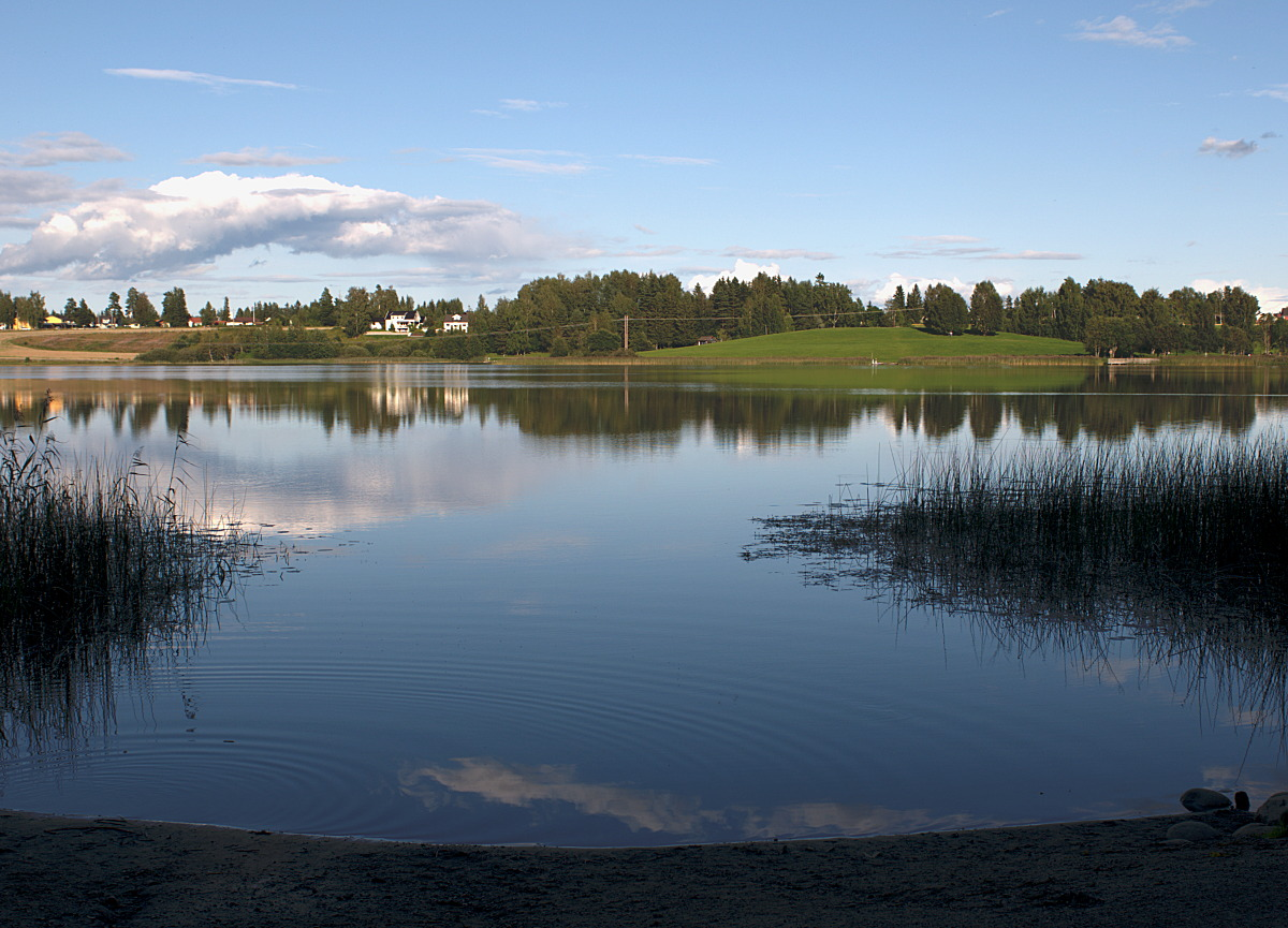 Nordytjernet ved Jessheim, mot badestranden.